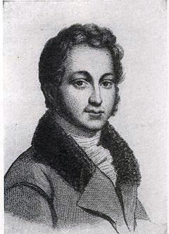 Le baron Frédéric de Reiffenberg (1795-1850), érudit et polygraphe belge. Professeur à l'Université d'État de Louvain.